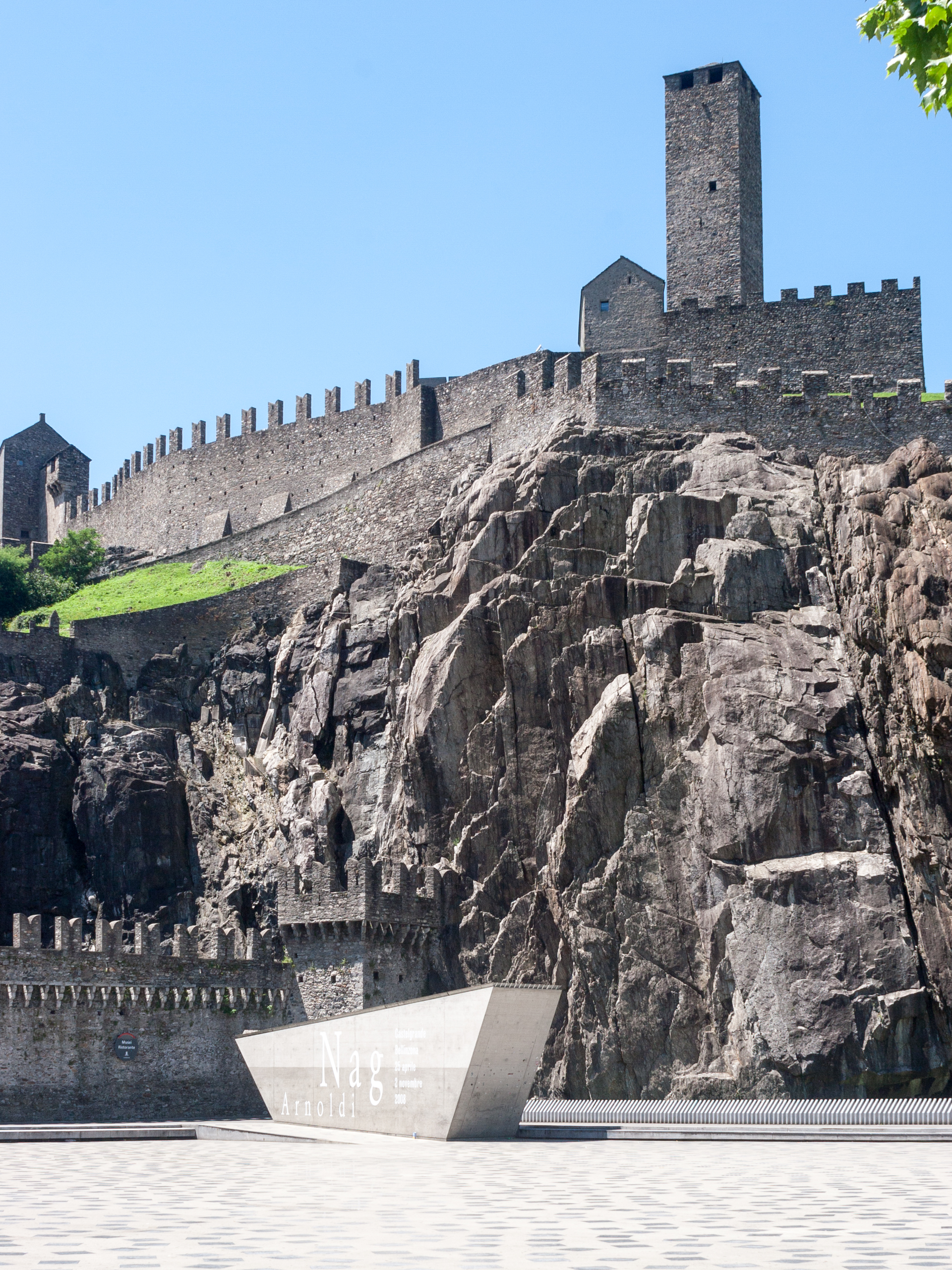 Castelgrande in Belinzona